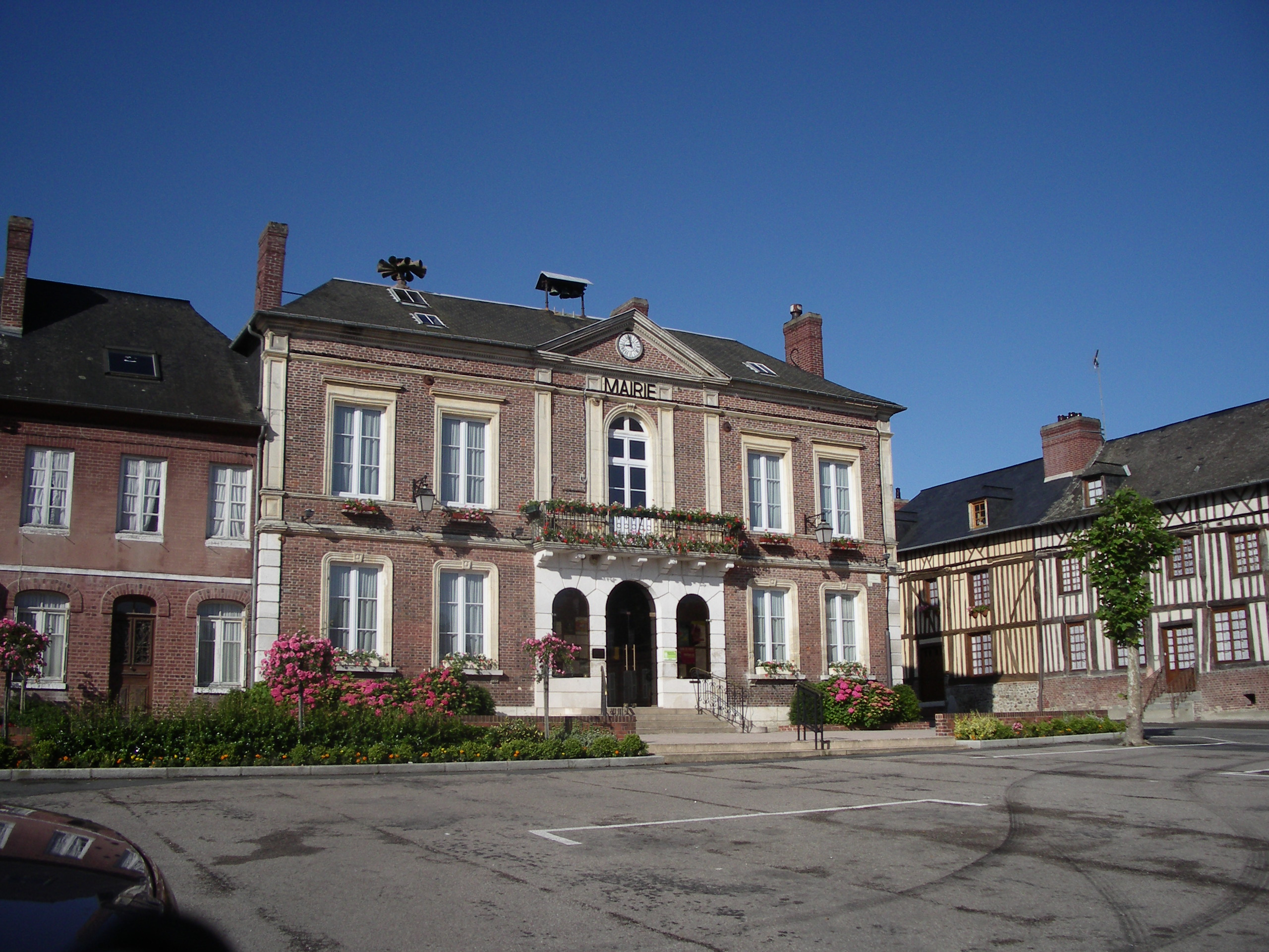 Mairie de Saint Georges du Vievre